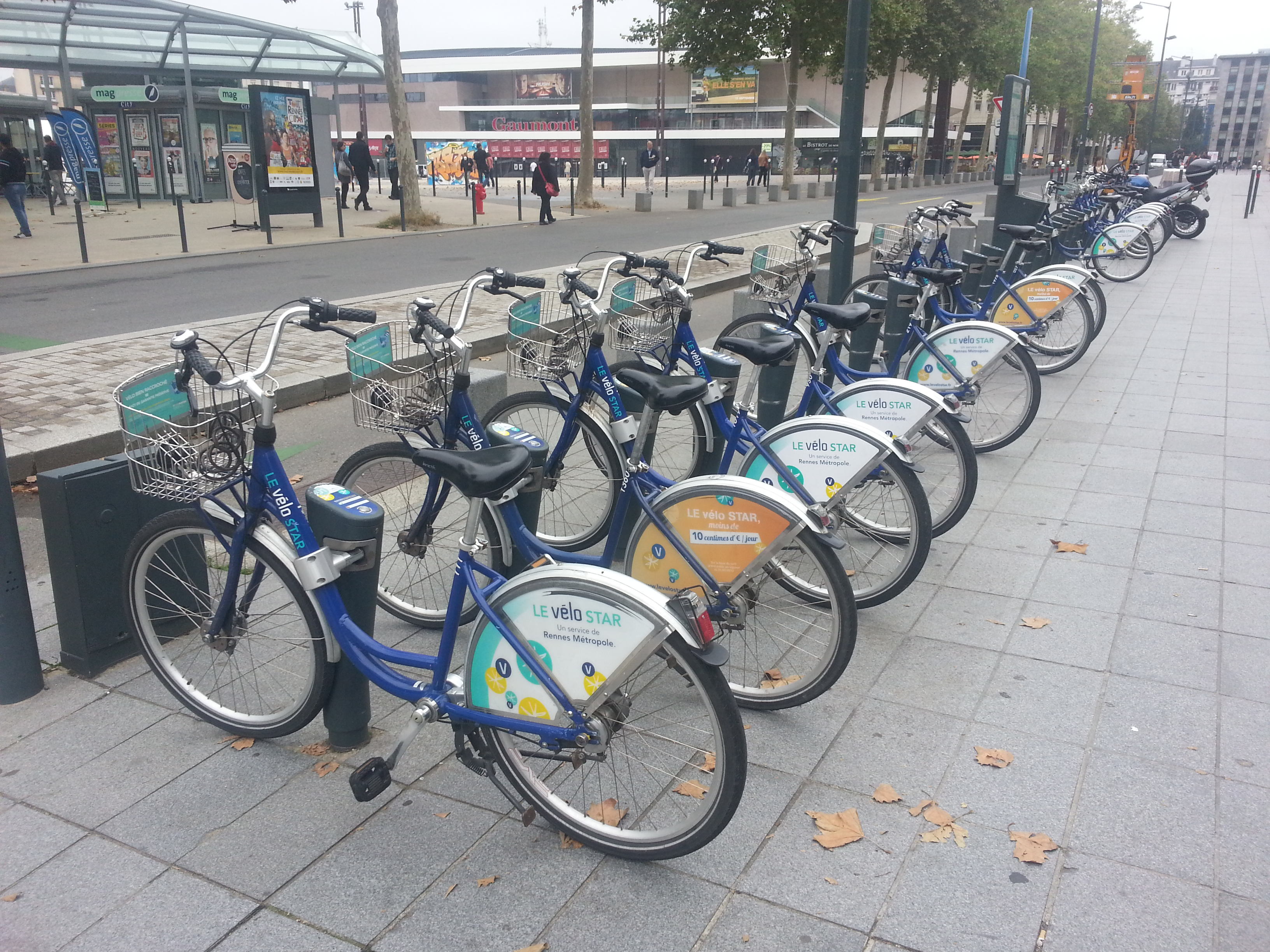 vue d'ensemble